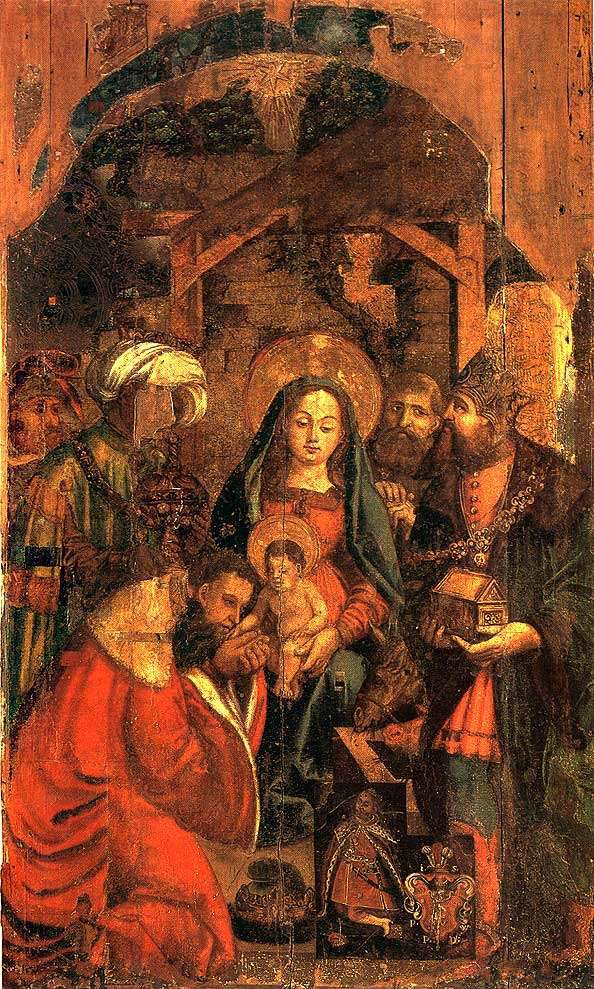 Пакланнее Вешчуноў. 16 - 17 ст. Дошка, яечная тэмпера. 175х101,5х2,5. в. Дрысвяты, be:Браслаўскі раён, be:Віцебская вобласць. У фондах Музея старажытнабеларускай культуры